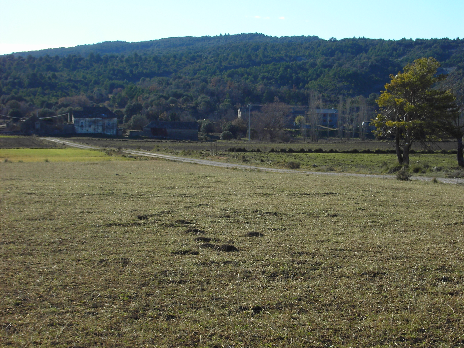 Vista general de Sarratillo, junto a Santa María de Buil, en la depresión de Arcusa, sur de Sobrarbe, Huesca.